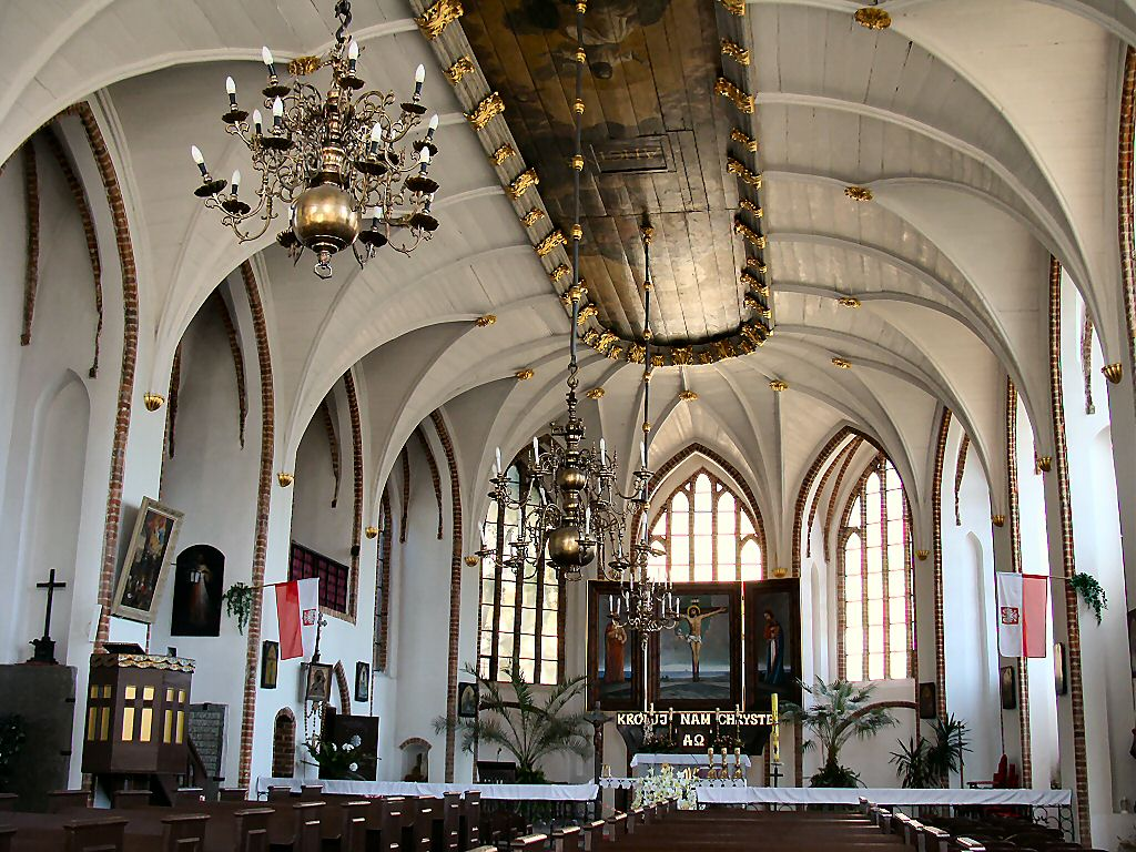 Szczecin - wnętrze kościoła pw. św. Piotra i Pawła